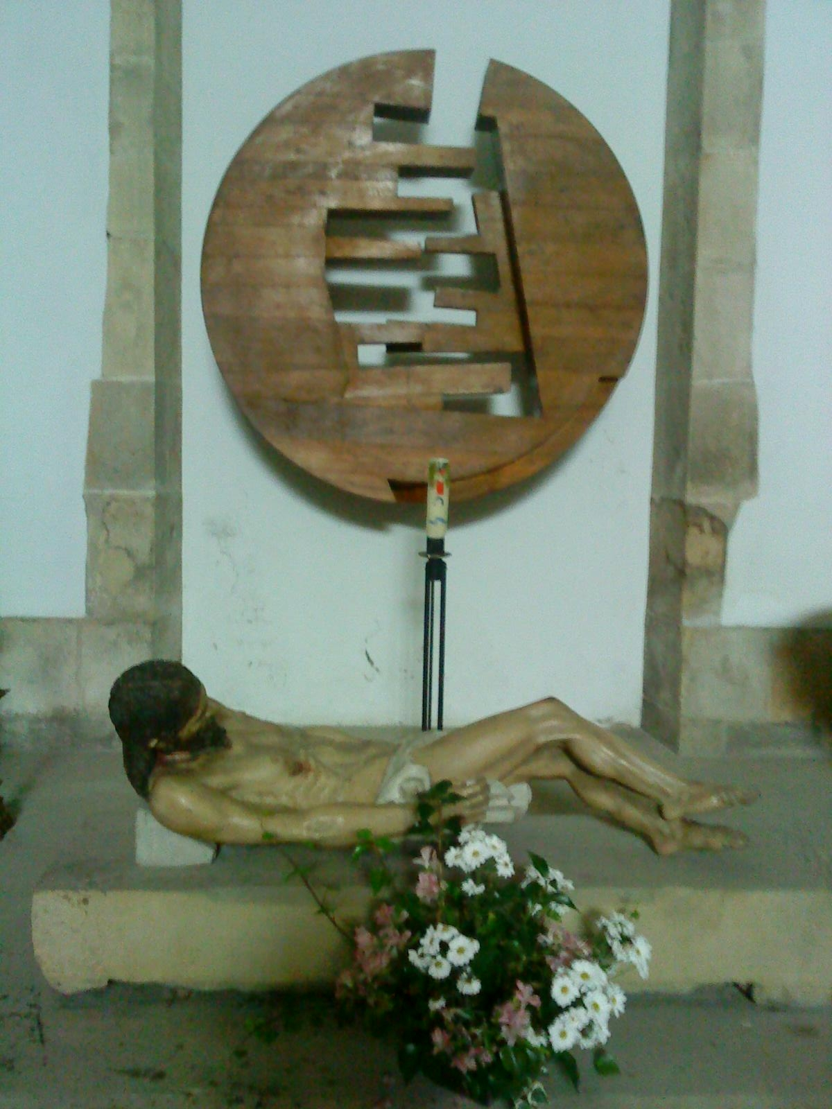 Iglesia de San Miguel de Iurreta en Bizkaia, País Vasco (España). Cristo yaciente.